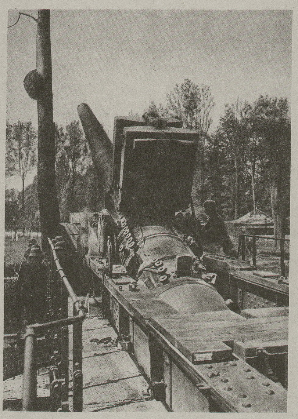 deutsches 38 cm Langrohrgeschütz